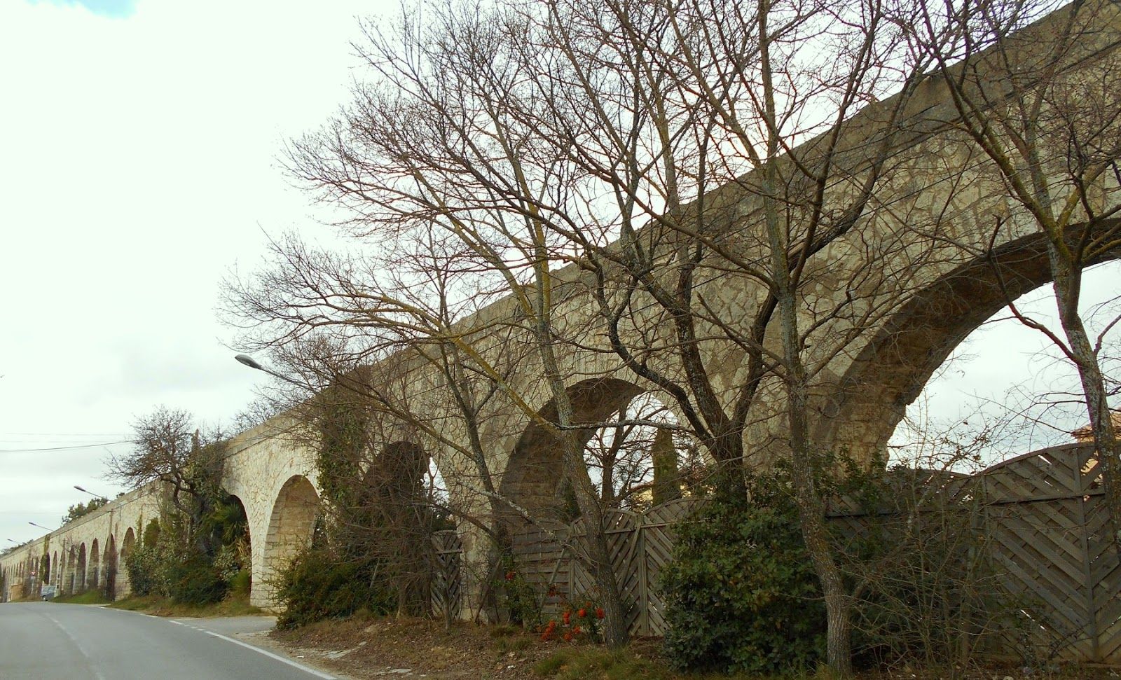 Pont-aqueduc de Calèche (photo récente prise depuis la départementale)